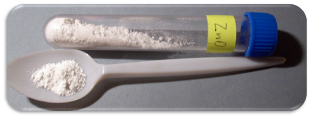 Oxid zinečnatý - ZnO